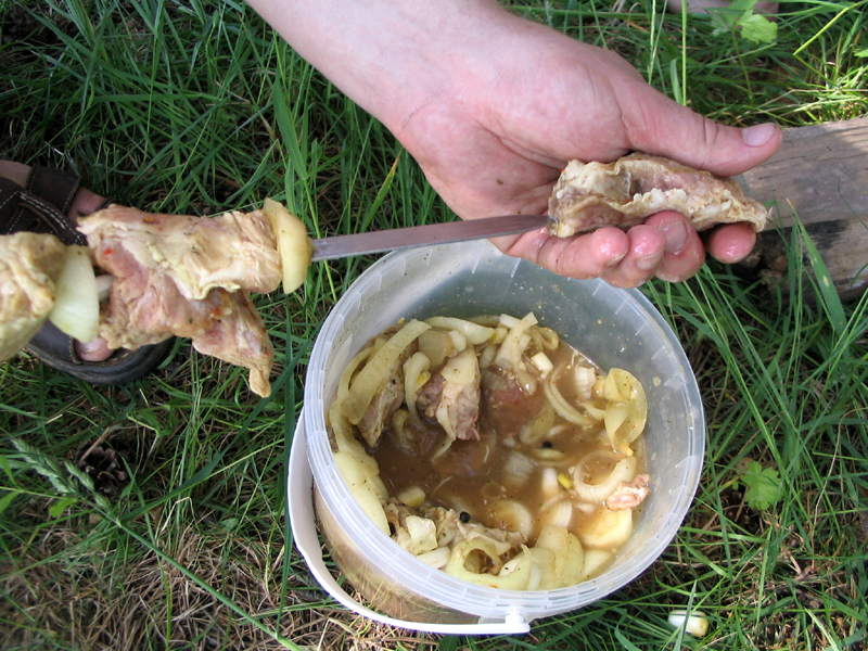 Шашлык.